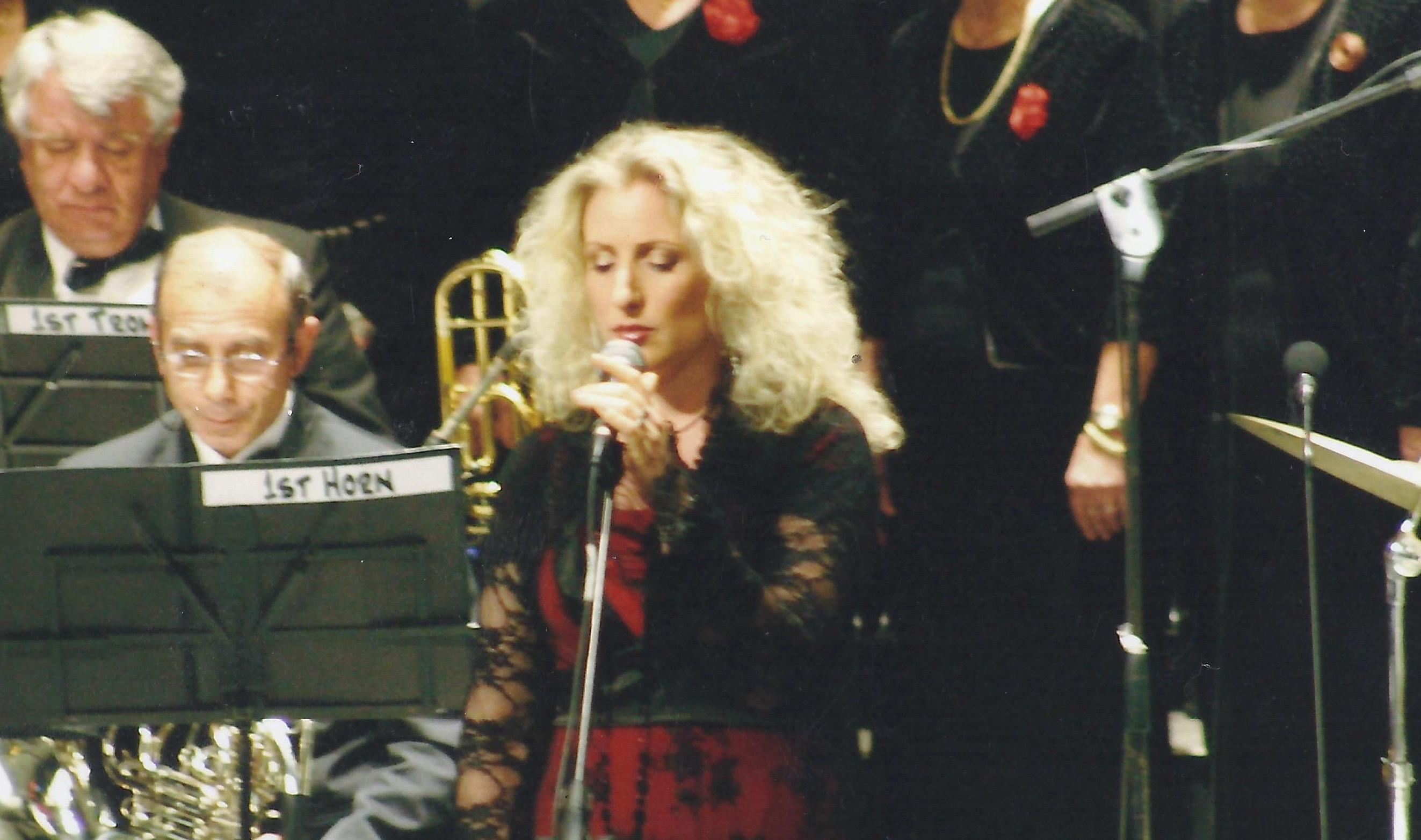 עדי ארד בהופעה